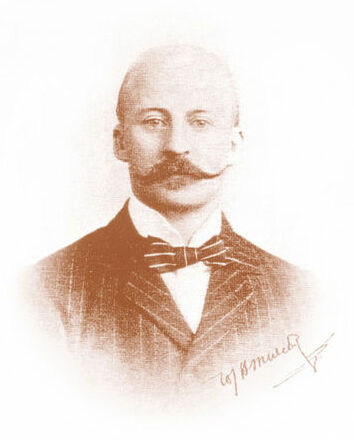 Afbeelding beschikbaar gesteld door het WJH Mulier Instituut, Den Bosch, Nederland.